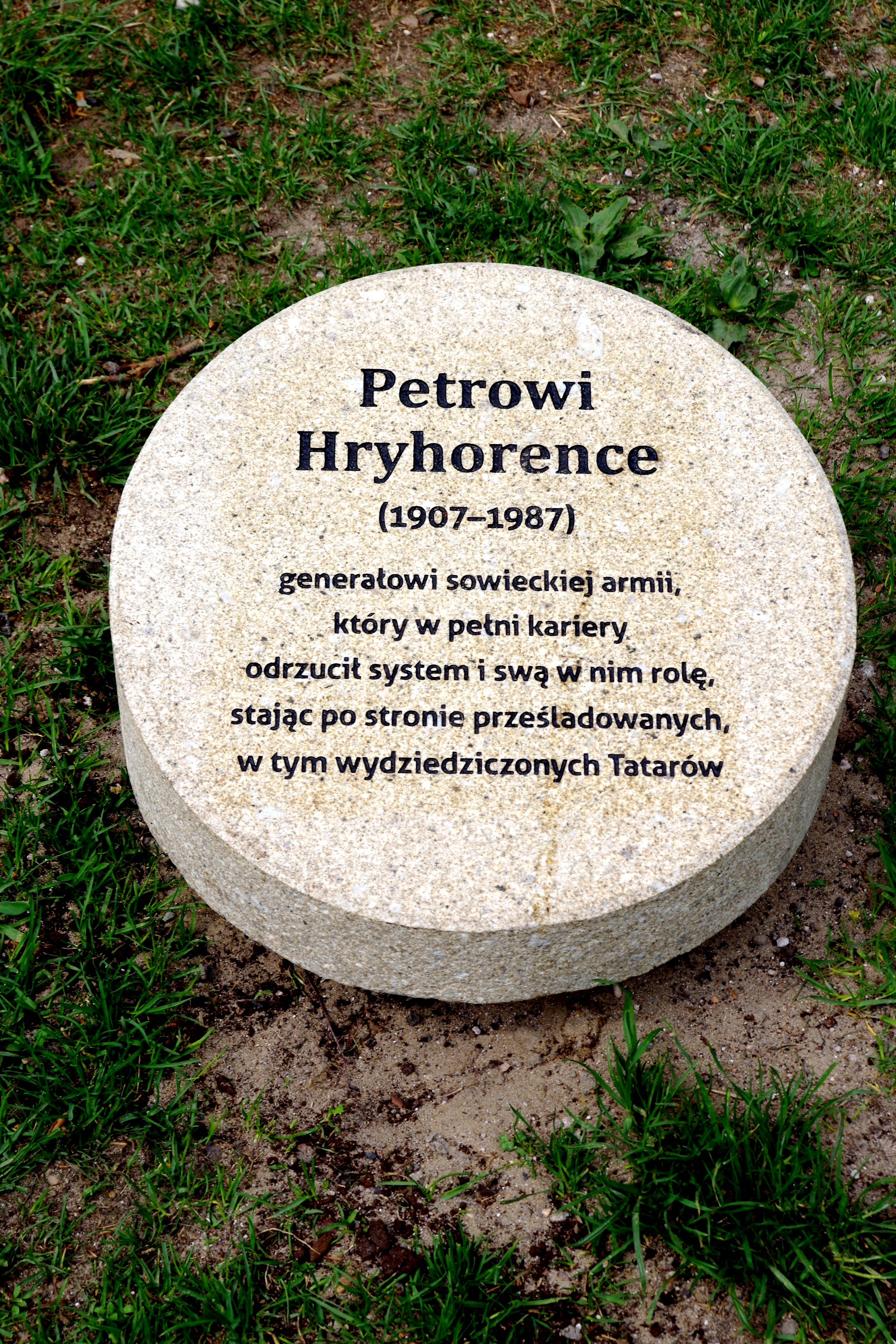 Obelisk upamiętniający Petra Hryhorenkę w Ogrodzie Sprawiedliwych w Warszawie